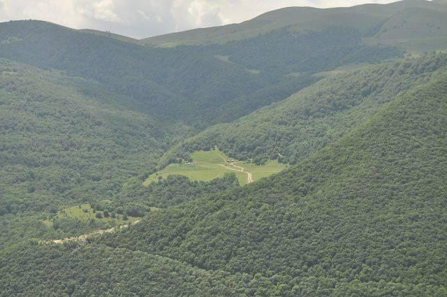 Dağ silsilələri